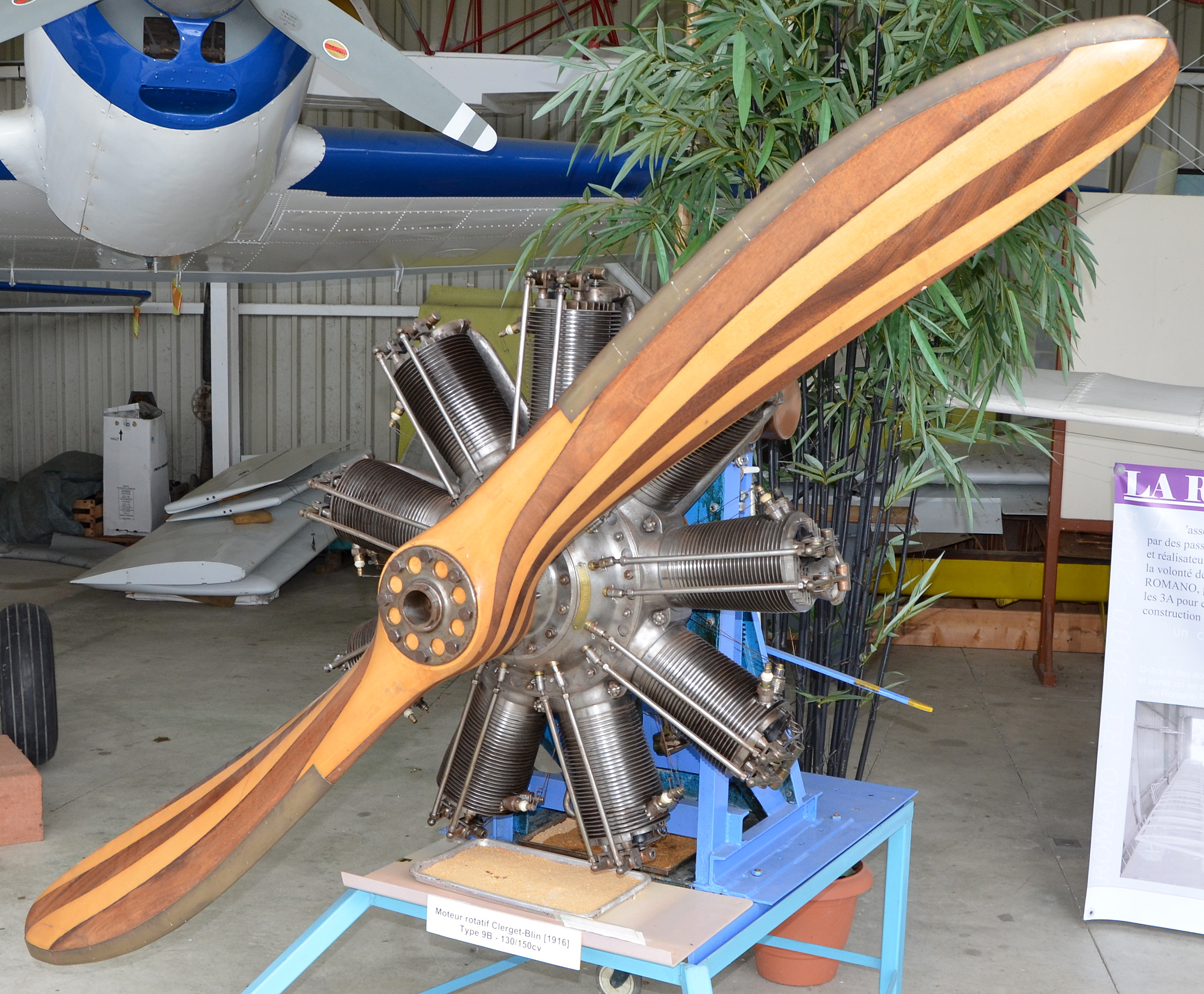 Moteur d'avion rotatif Clerget-Blin 9B de 1916 puissance de 130 a 150 CV/ Exposé au Musée historique de l'hydraviation, Biscarrosse, France